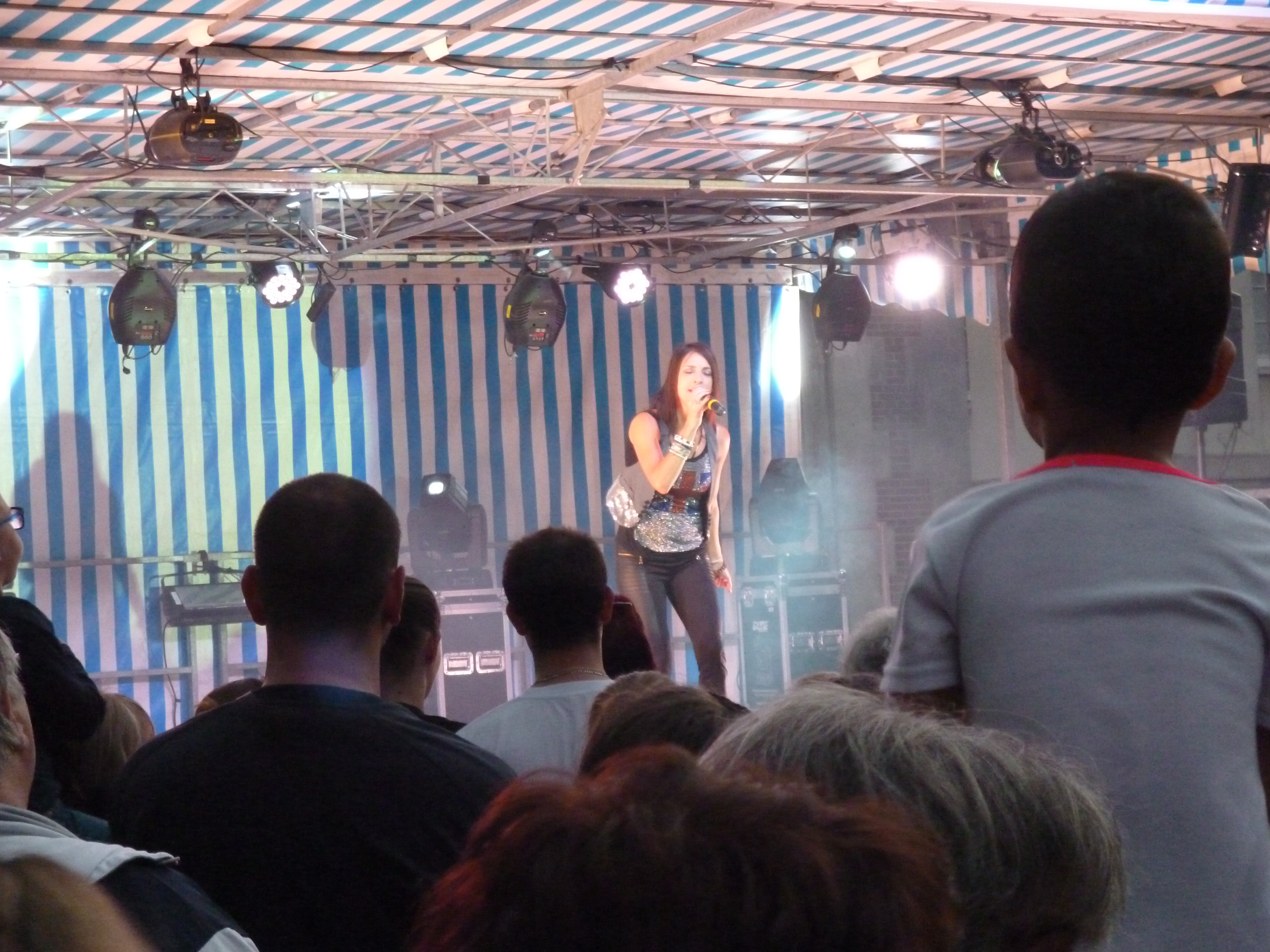 La chanteuse française Eve Angeli, en concert, à Saint-Just-en-Chaussée (Oise), le 13 juillet 2015.